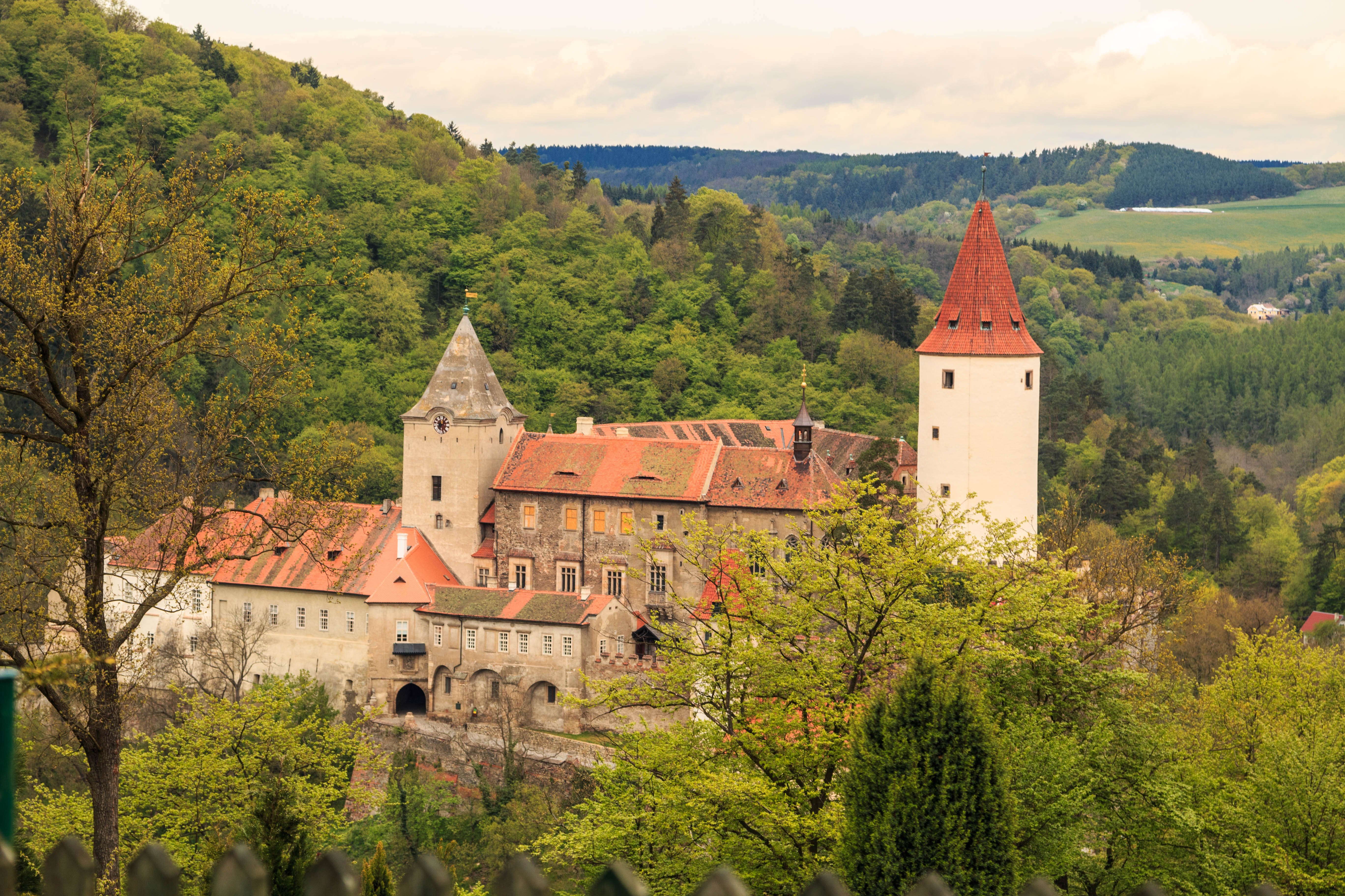 Hrad Křivoklát, Křivoklát 47, 48, 114, 132, 133, 134, 135, 136, 137, Křivoklát (městys). Project: Chráněná území.